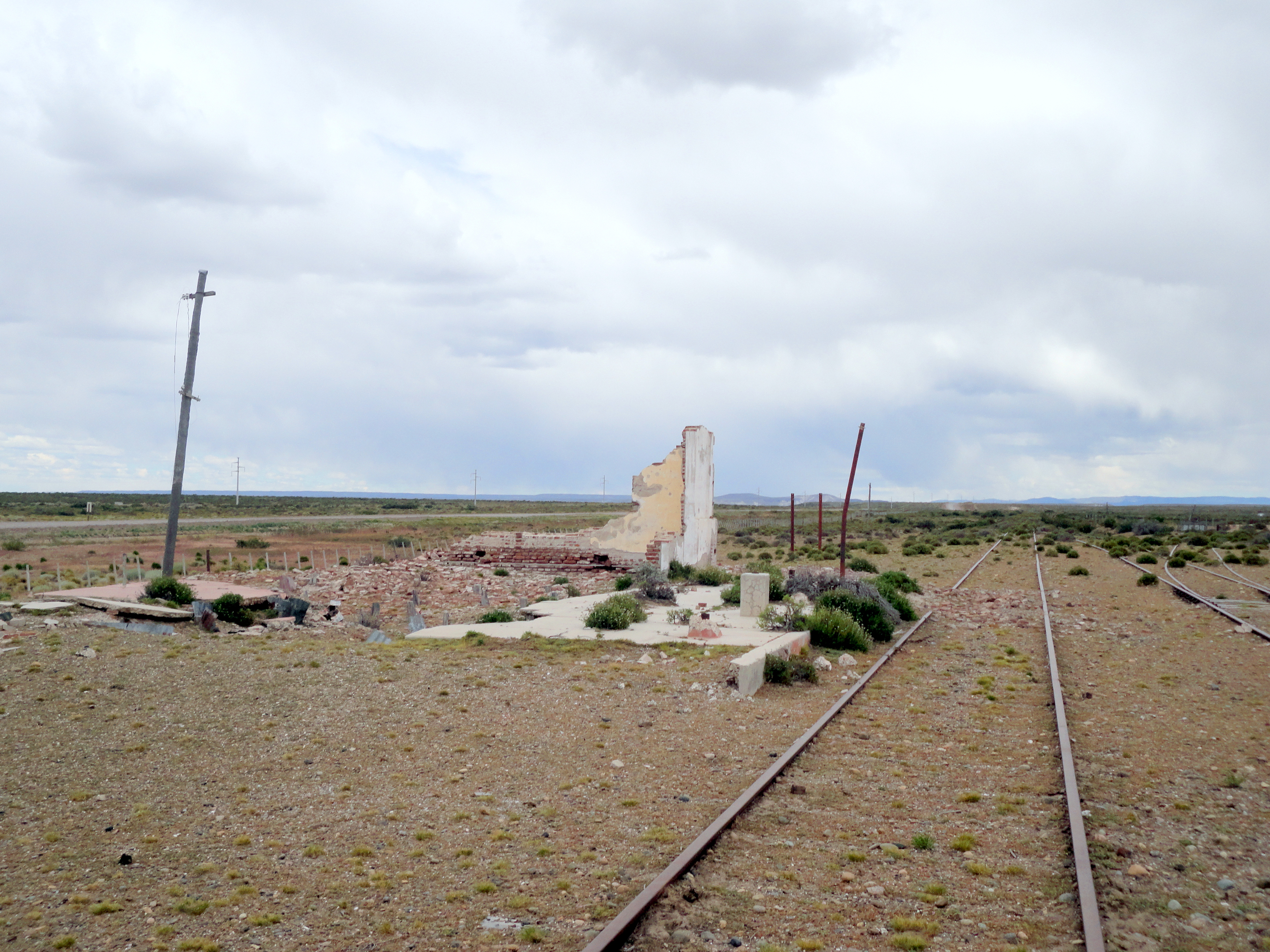 Restos de la estación km 162